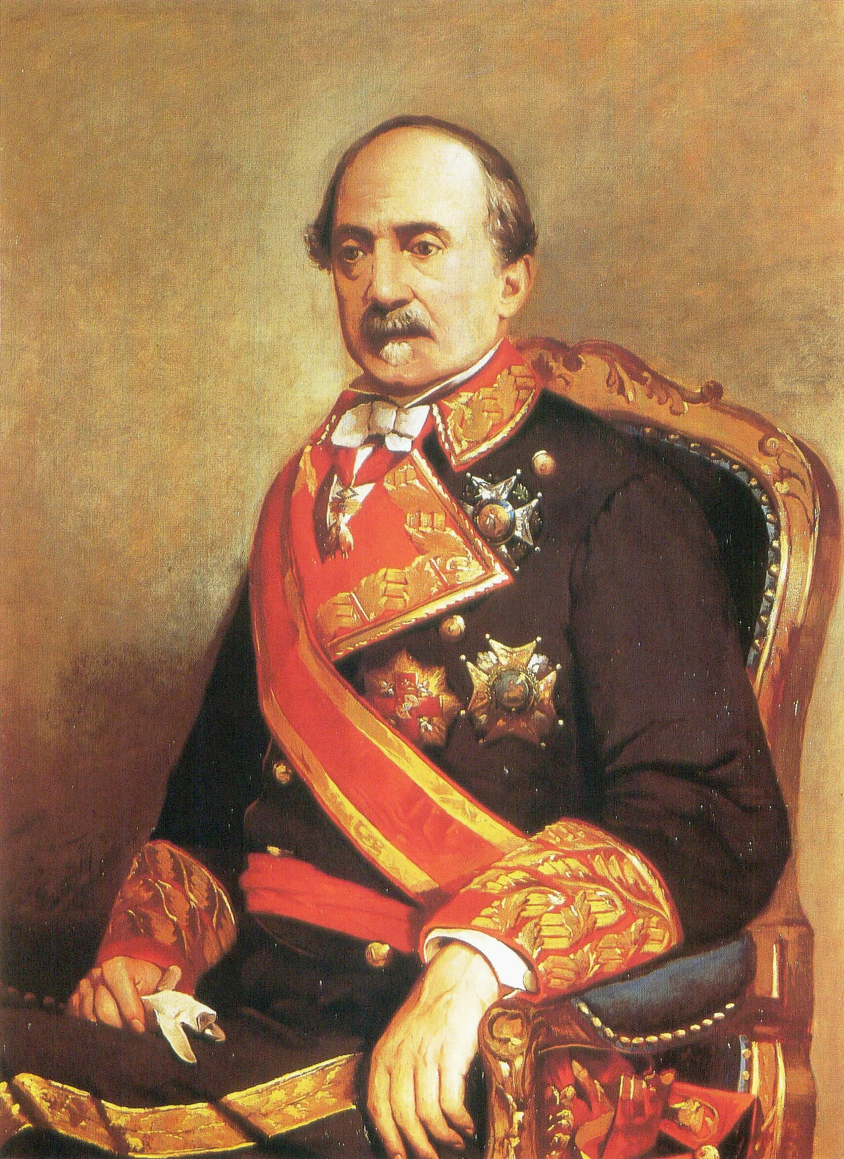 Retrato del general español Manuel Gutiérrez de la Concha e Irigoyen (1808-1874), primer marqués del Duero y destacado militar de la Tercera Guerra Carlista, durante la que falleció.